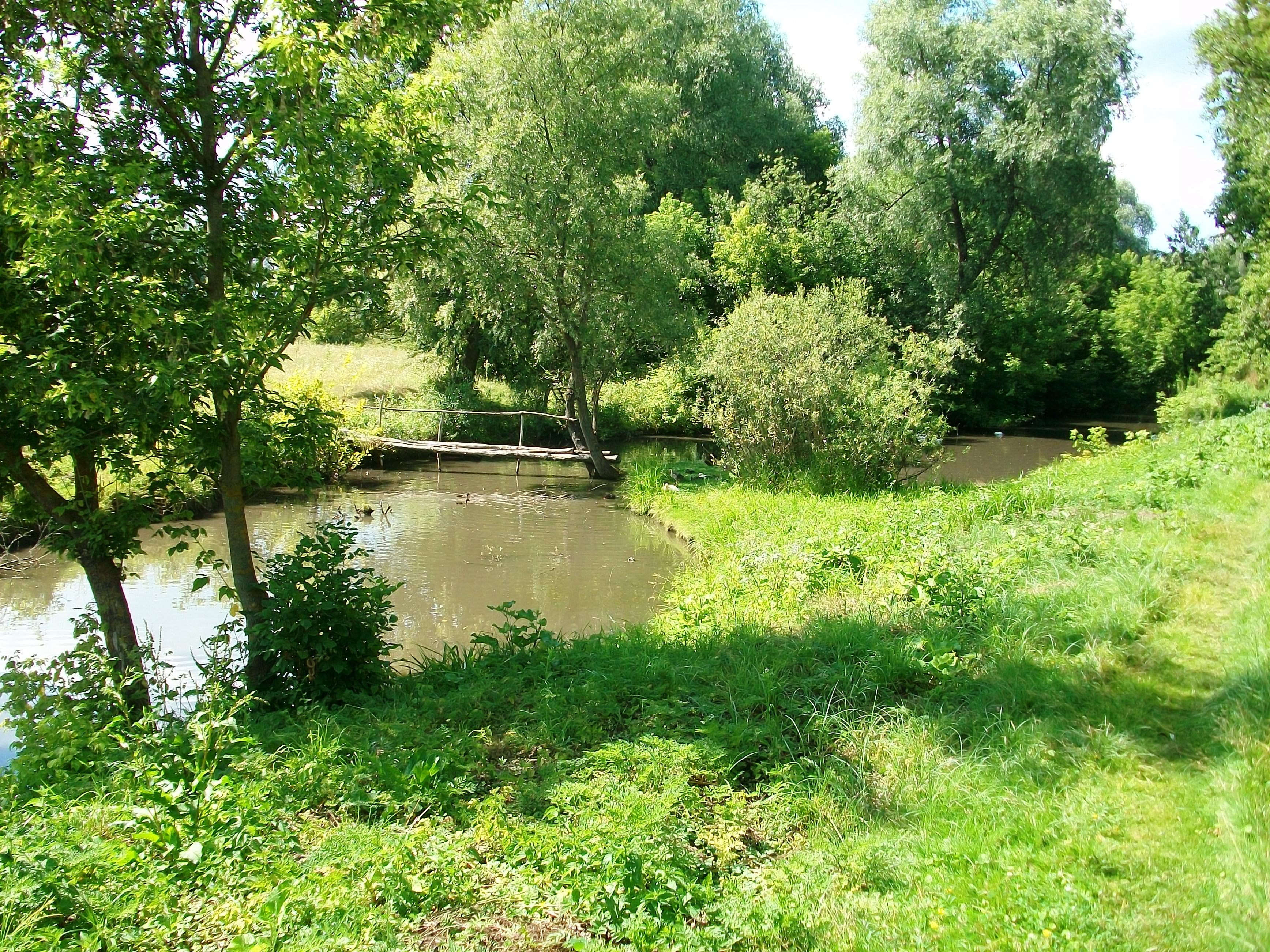 Сліпород. Ракита. Вигляд 1